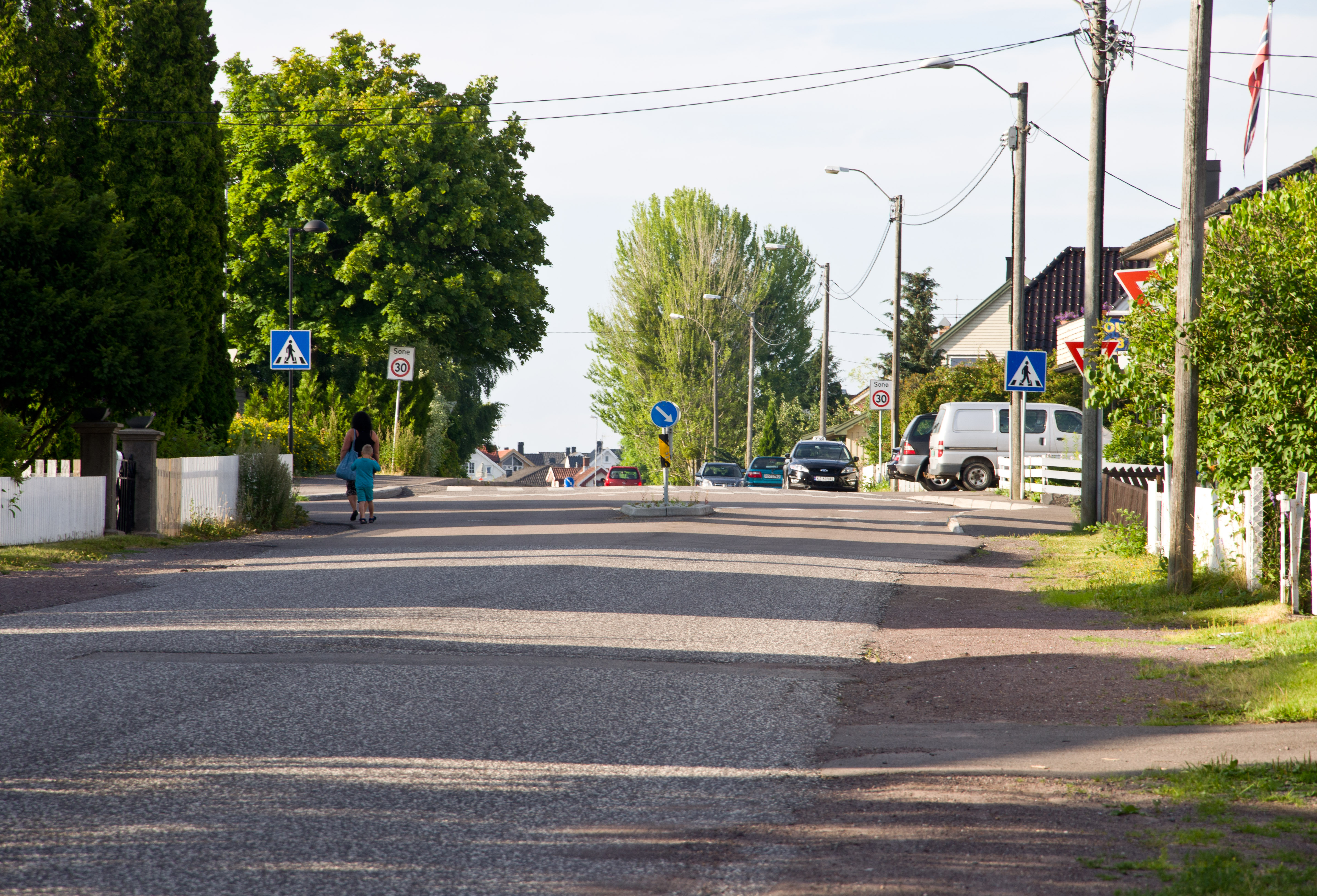 Fylkesvei 703 Arne Beckers gate, Horten